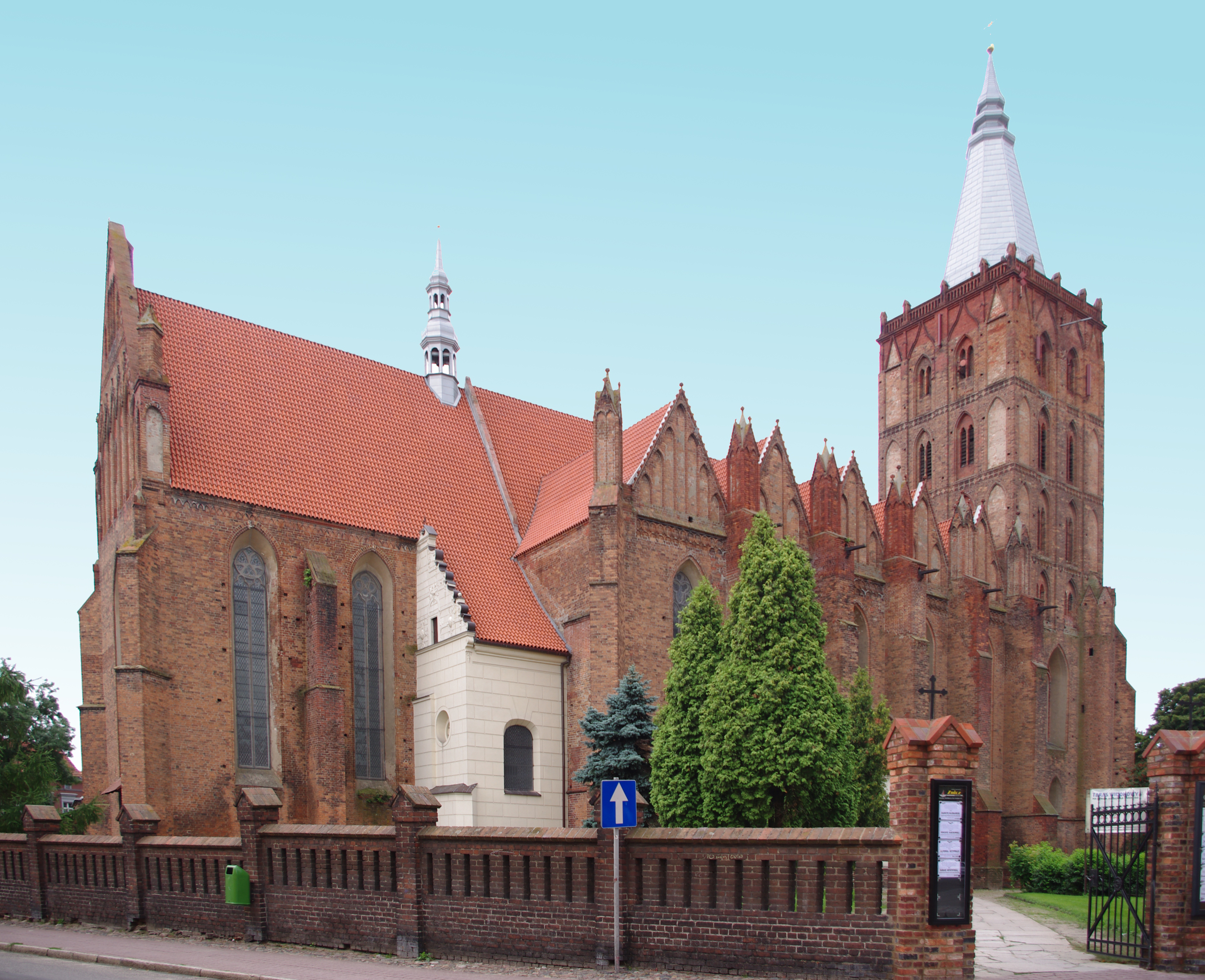 Chełmno, kościół farny p.w. Wniebowzięcia NMP, 1290-1331